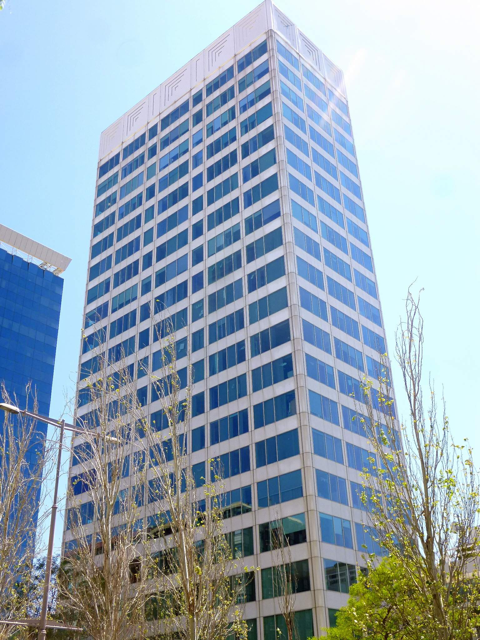 Edificio Tarragona (Barcelona)